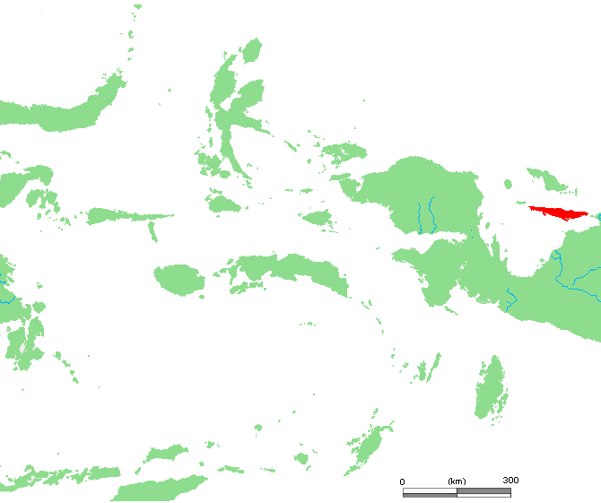 ID Yapen.PNG